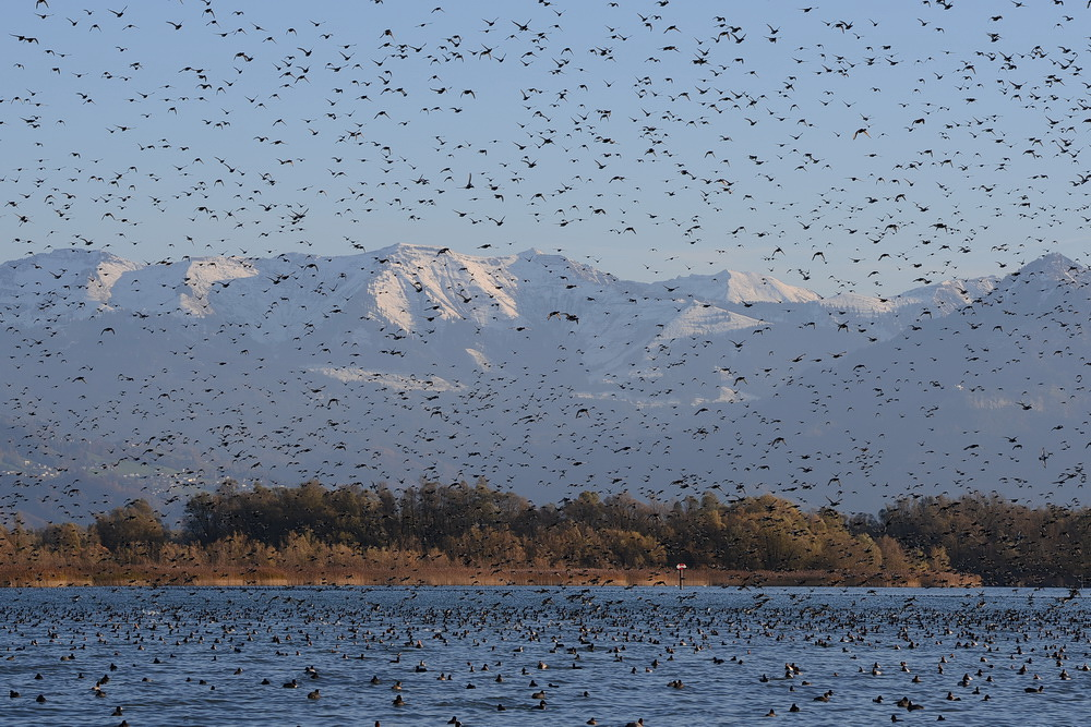 Wasservögel in der herbstlichen Fussacher Bucht im Naturschutzgebiet Rheindelta, Vorarlberg, Bodensee